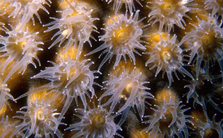 Montastraea cavernosa, pólipos expandidos